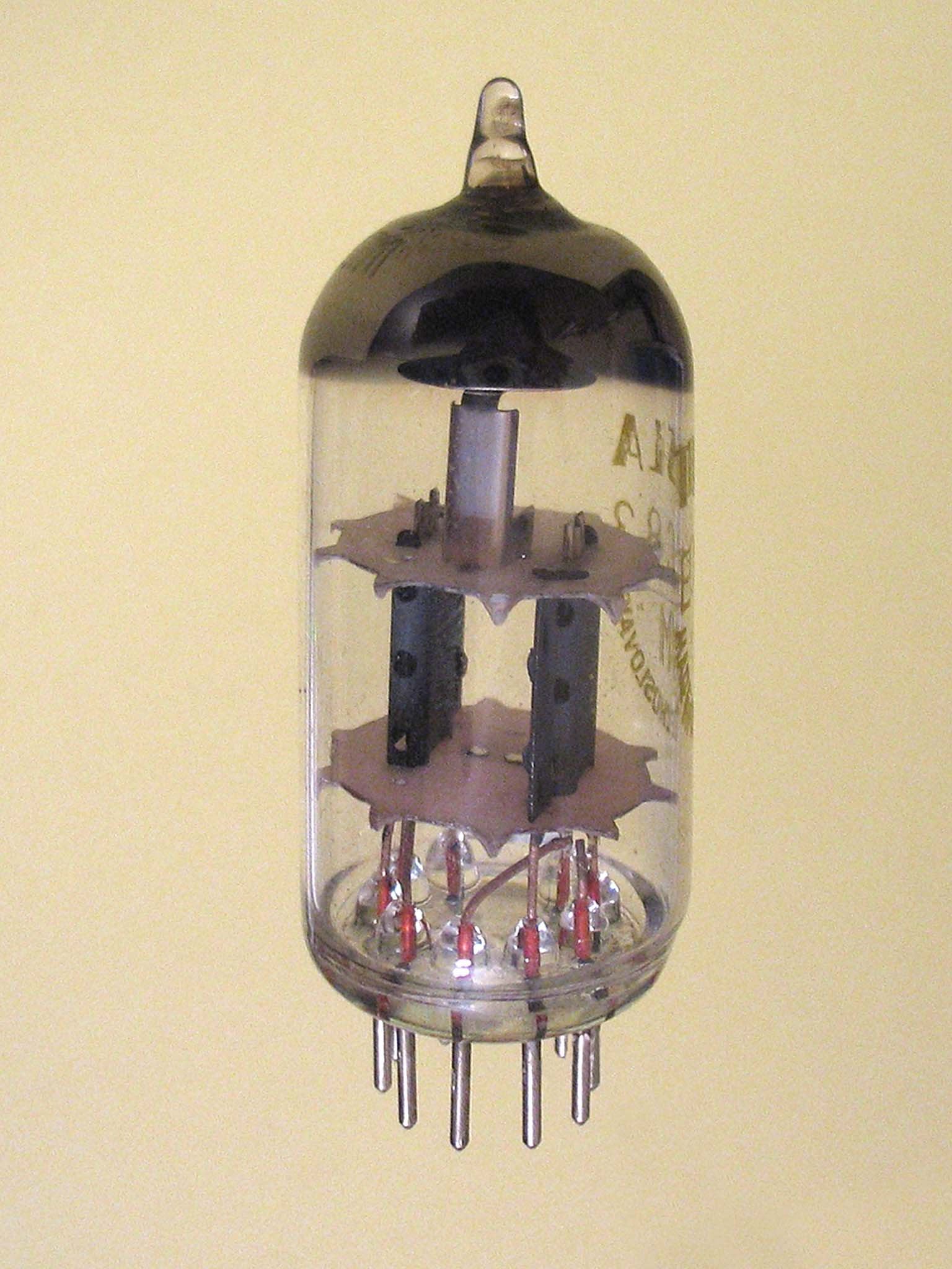 ECC 83 Tube (Tesla)